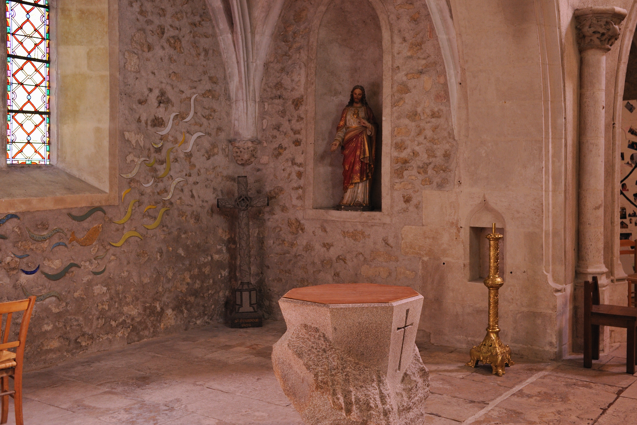 Église Saint-Sauveur, Argenton-sur-Creuse, Indre, France